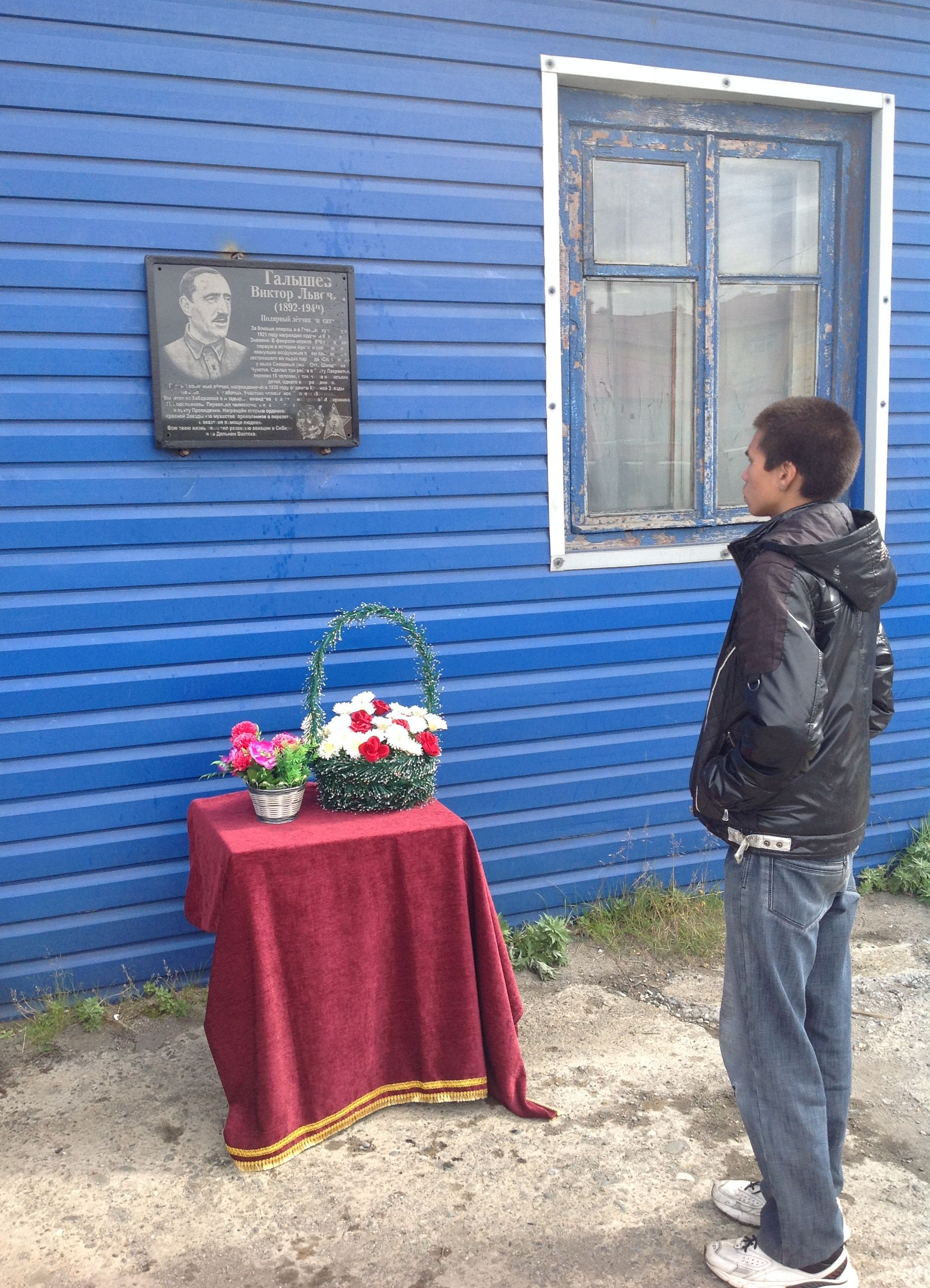 Мемориальная доска Виктору Галышеву на Чукотке, в с. Лаврентия